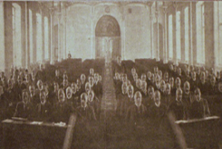 Fotografia z pierwszego posiedzenia Senatu RP z 1922 roku zamieszczona na stronie www Senatu First session of Senate of Republic of Poland